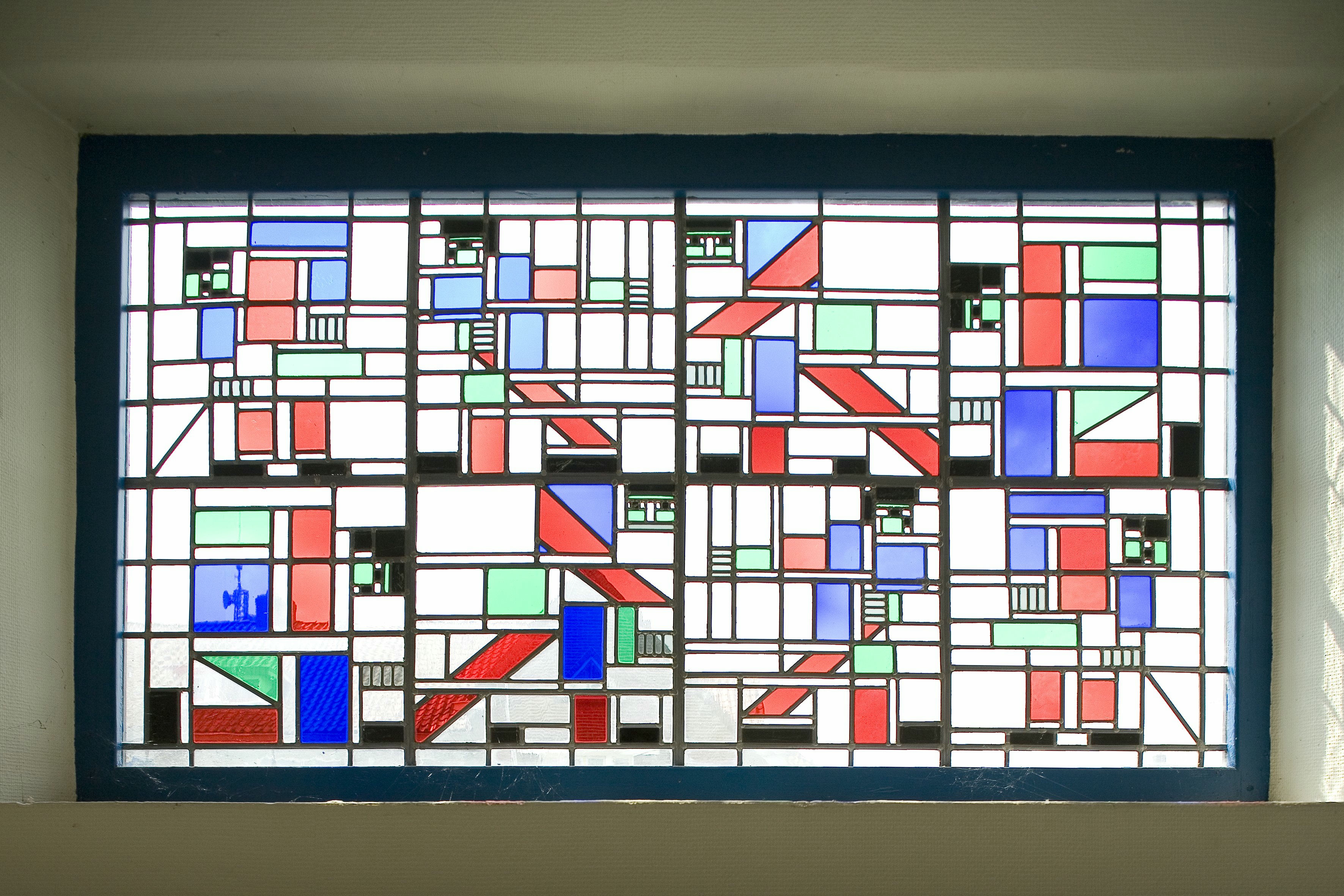 Voormalige Rijks Landbouw Winterschool: Interieur, aanzicht glas-in-loodraam van Theo Van Doesburg, bevindt zich boven de ingang in de voorgevel